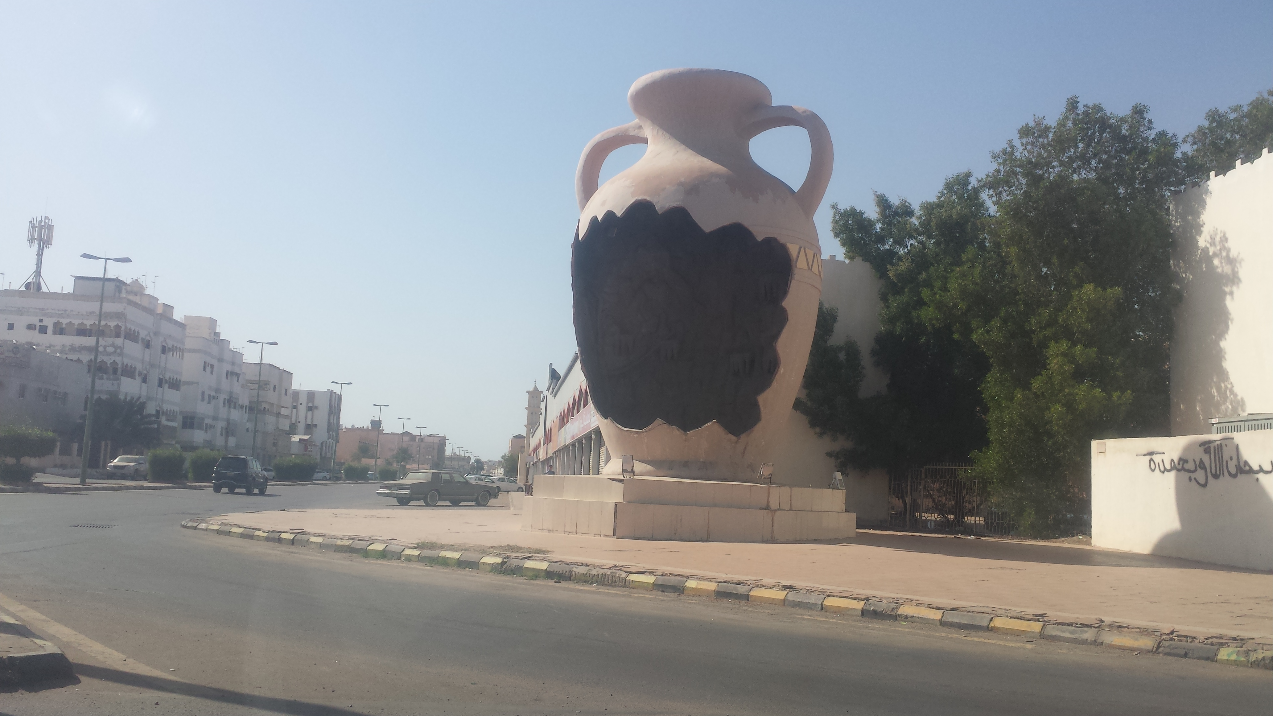 Yanbu Saudi Arabia